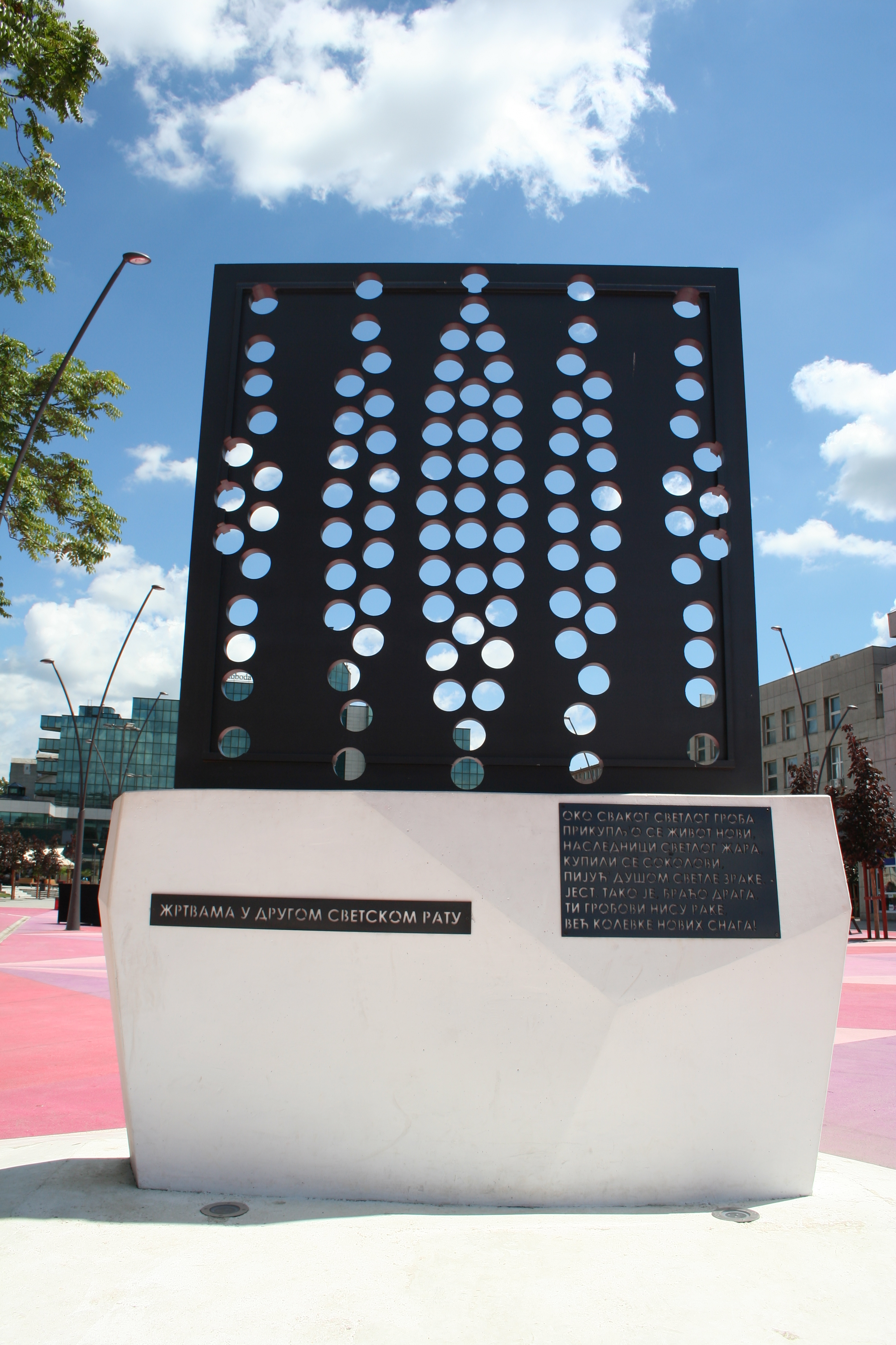 Spomenik žrtvama u Drugom svetskom ratu